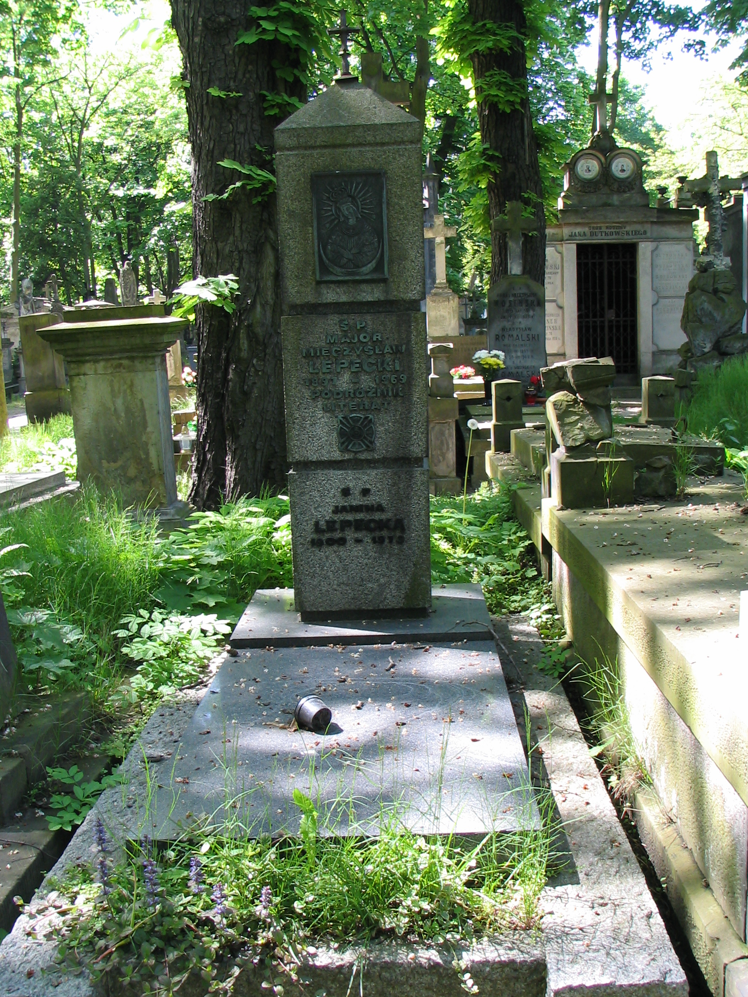 Nagrobek Mieczysława Lepeckiego na Cmentarzu Powązkowskim, Warszawa, 14 maja 2008. Mieczysław Lepecki.